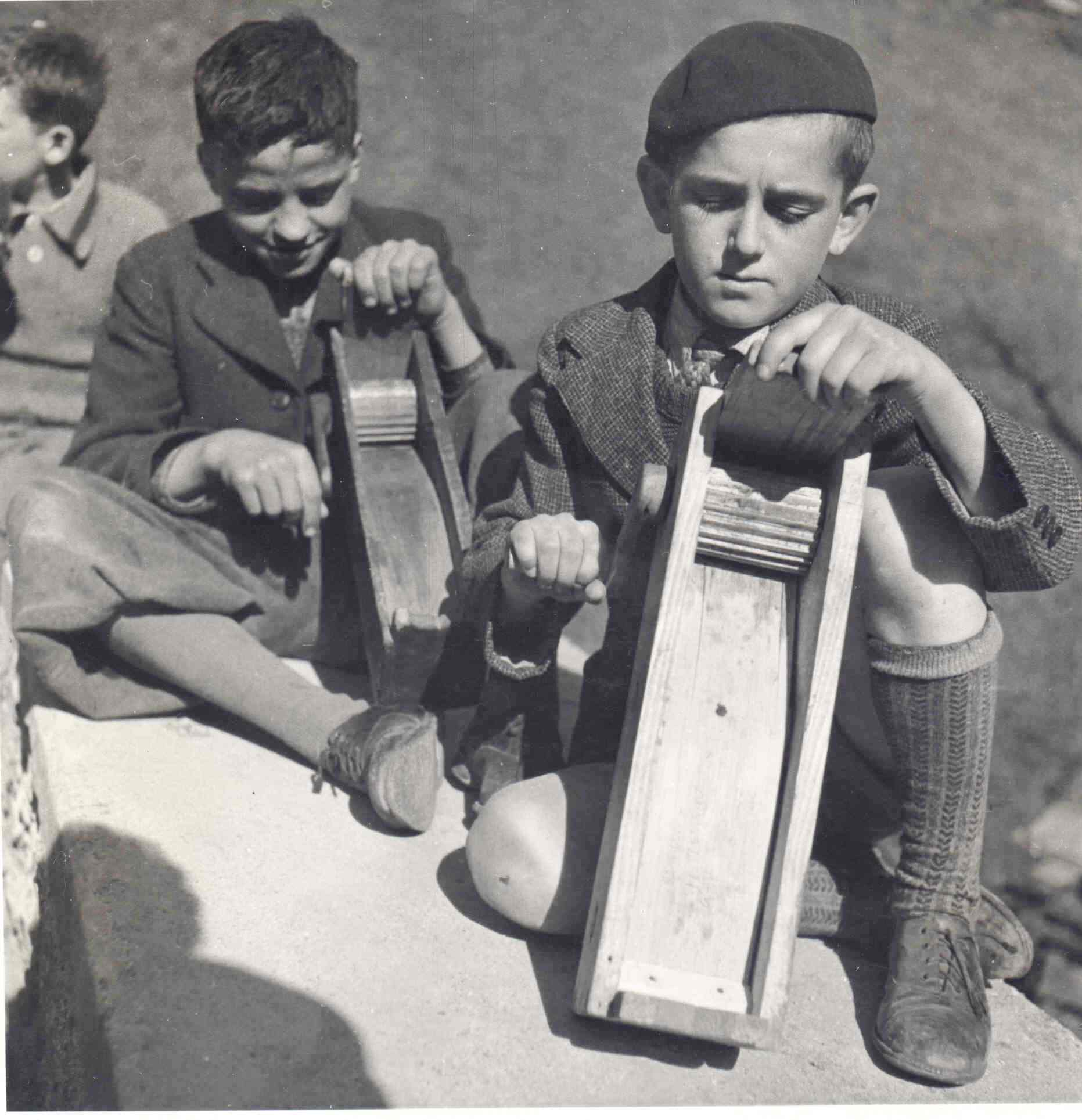 Na veliki petek Boga strašijo z ragljami.